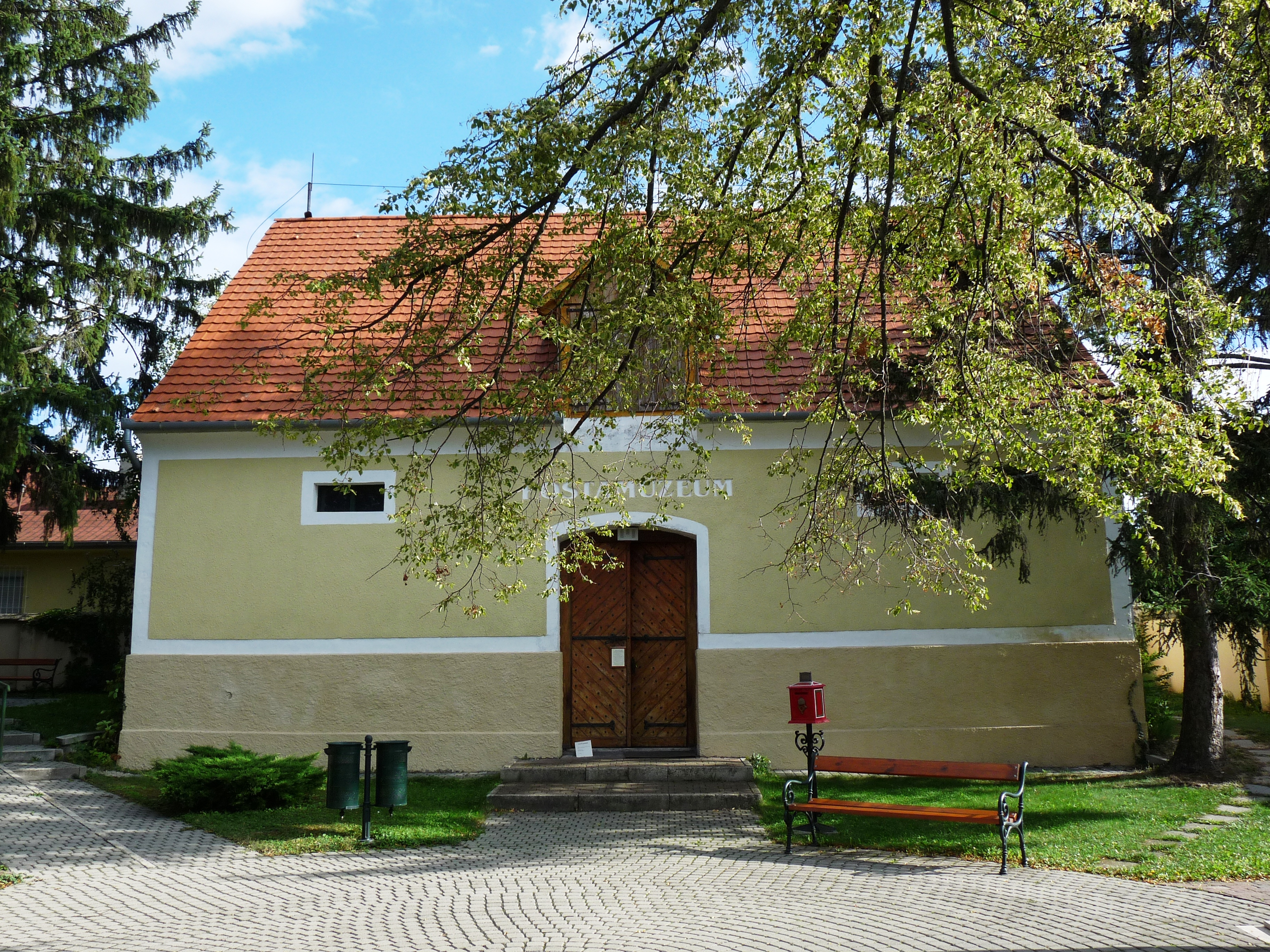 Postamúzeum, egykori istálló, Balatonszemes This is a photo of a monument in Hungary. Identifier: 7792